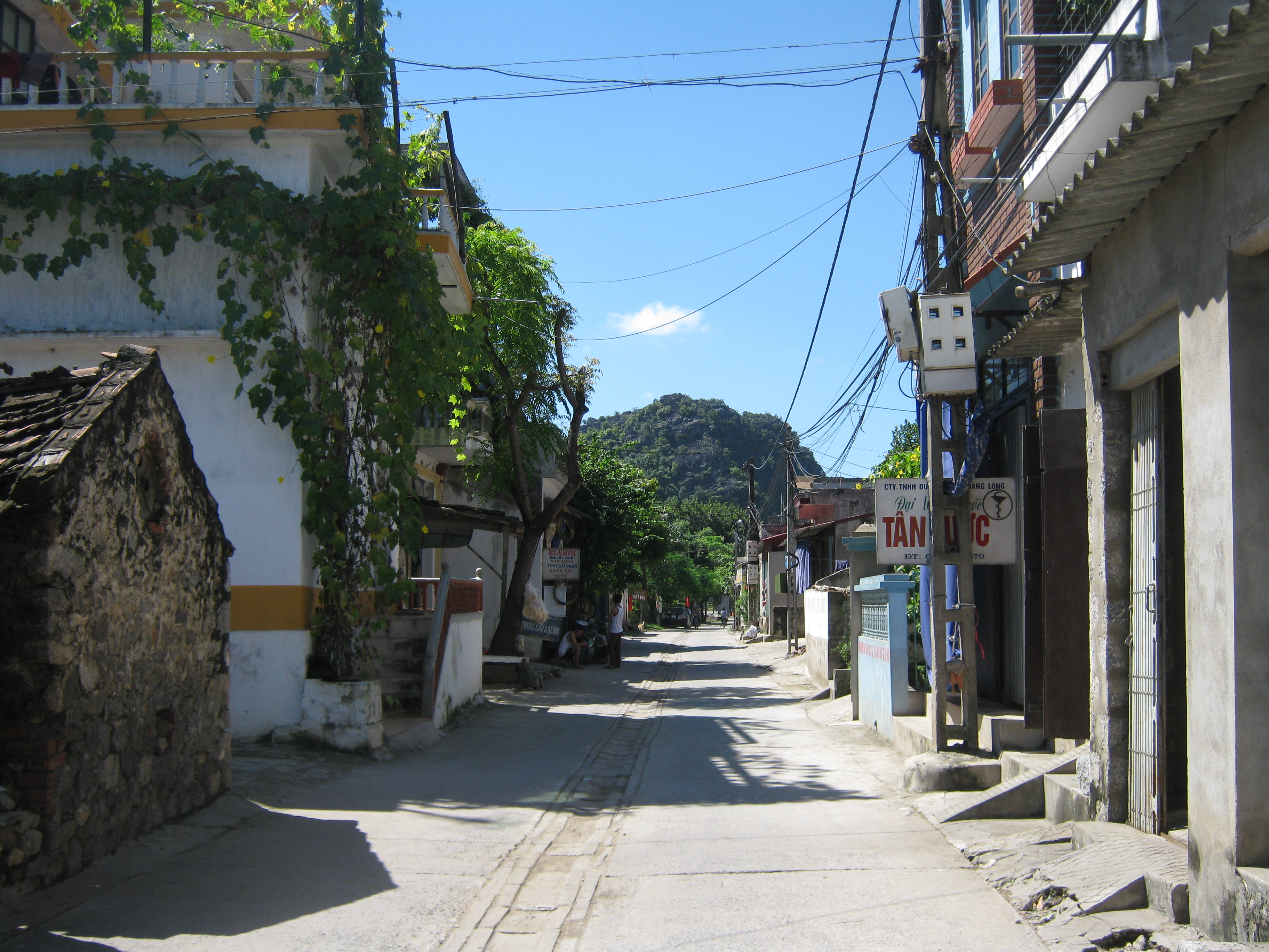 Phong cảnh cố đô Hoa Lư, Ninh Bình, mùa thu năm 2010